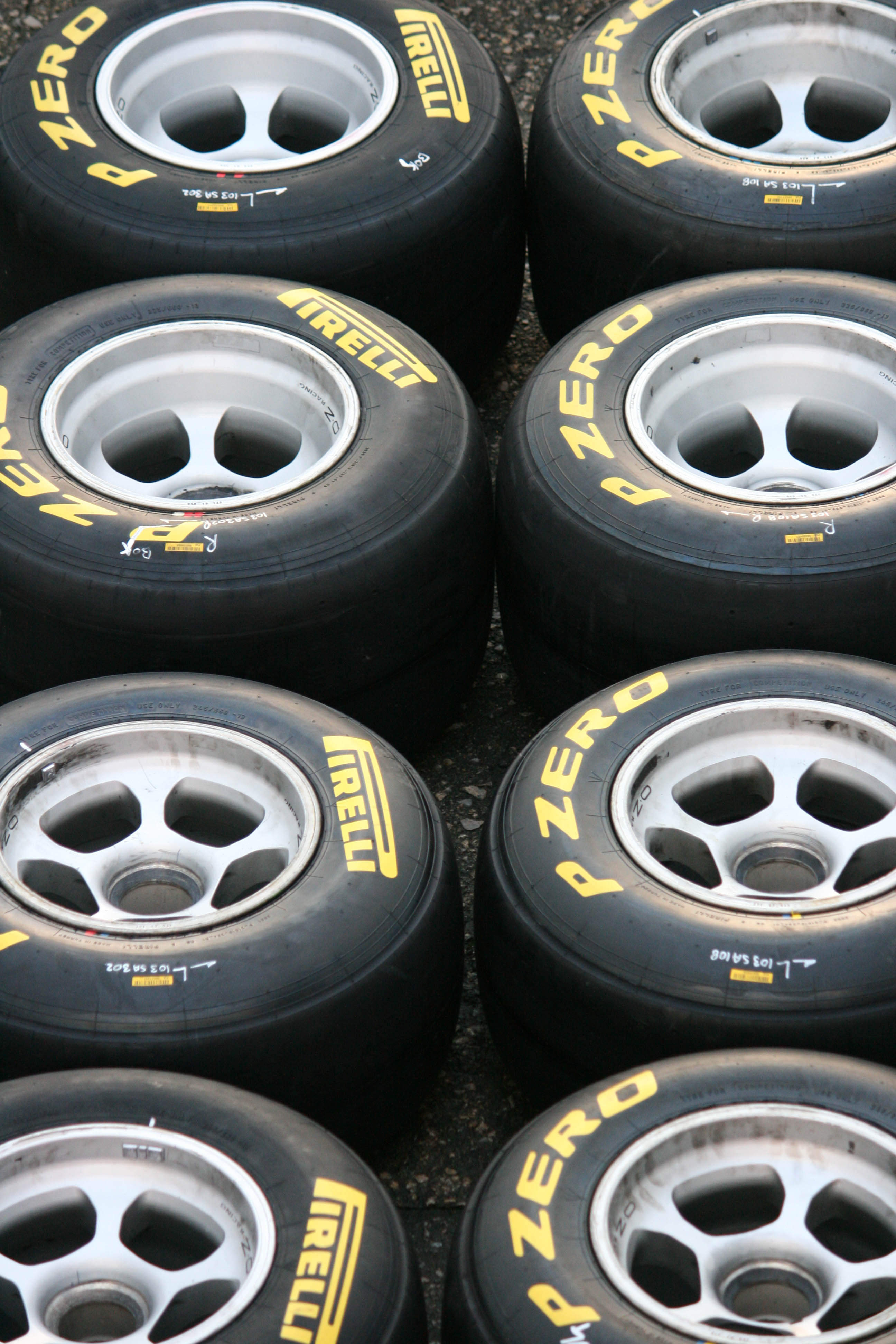 Pirelli